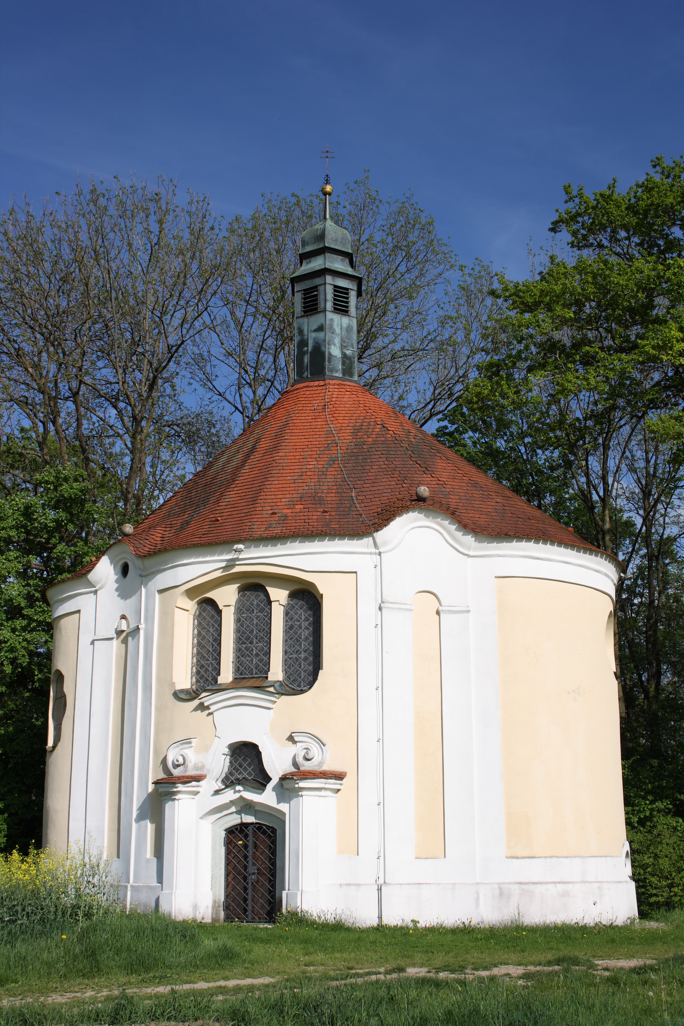 Katholische Kapelle Herrgottsruh in Lauingen, Dillinger Straße 62 (am Auwald)